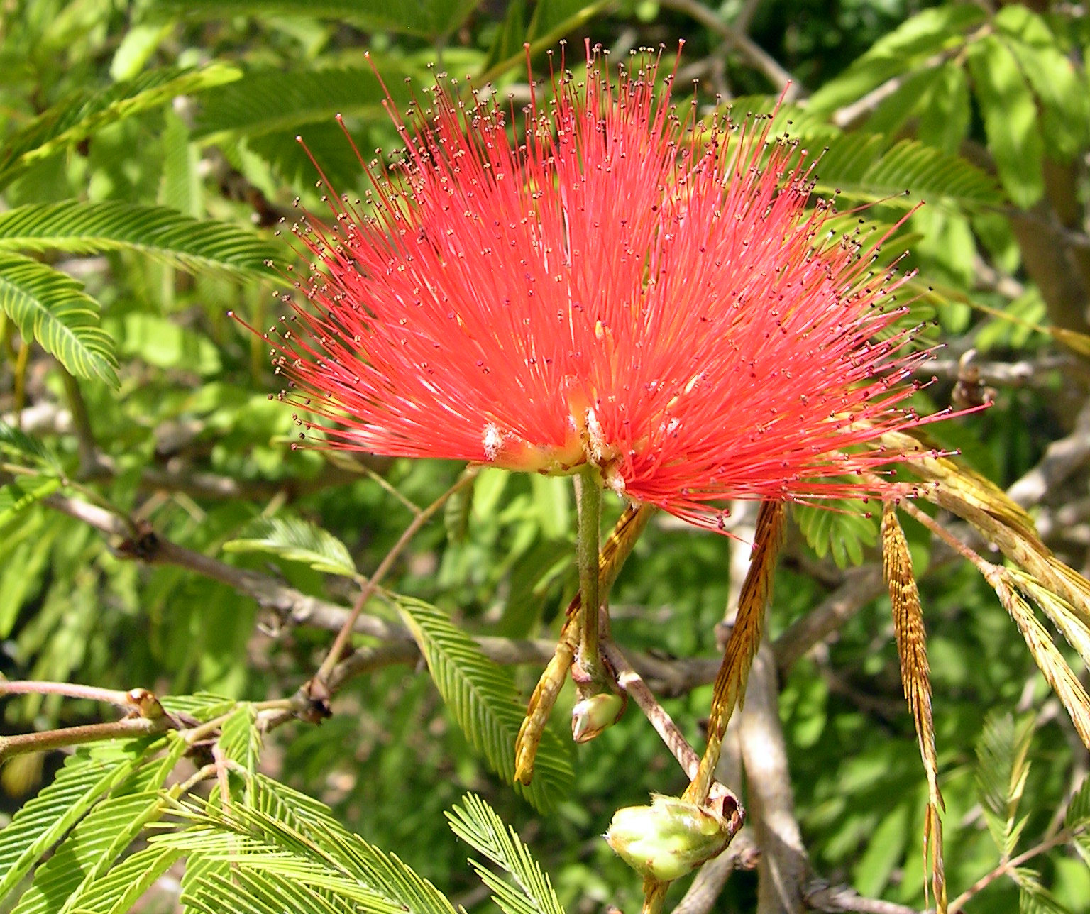 Calliandra tweediei, Borla de obispo, plumerillo rojo, en Jardì Botánic de Caixa de Girona-Cap Roig